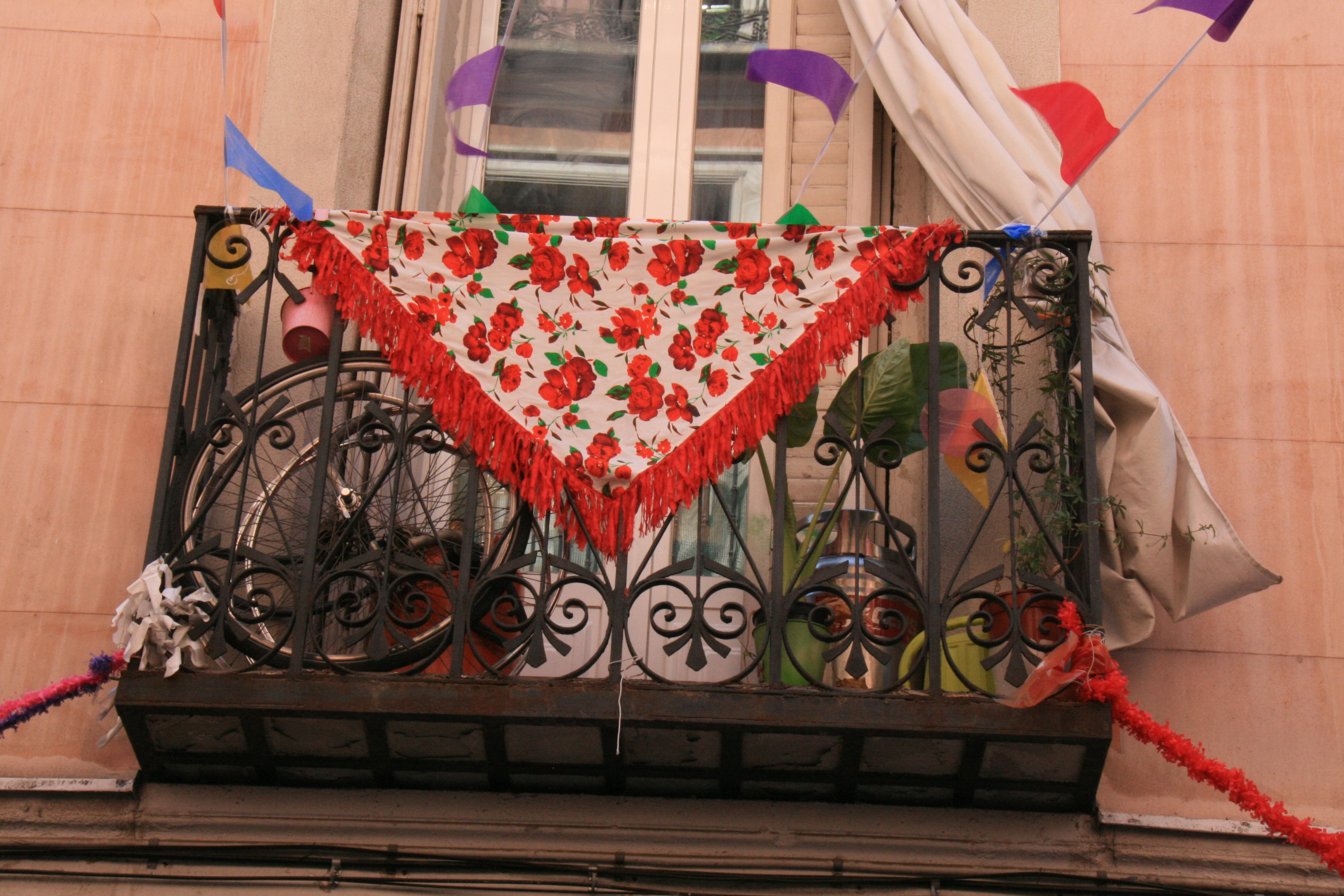 Balcón decorado en las Fiestas de San Cayetano